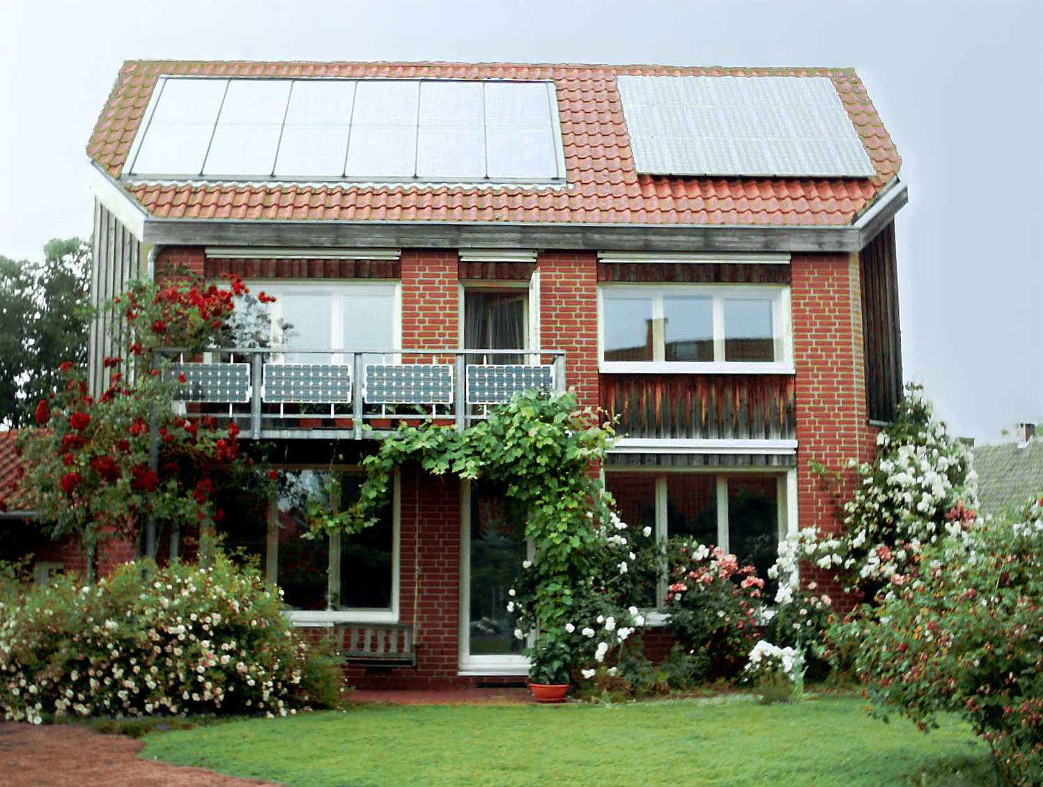 Nullenergiehaus der Familie Gebauer in Adenbüttel, Niedersachsen, erbaut 1992. Photovoltaik- und Solarthermieanlagen auf dem Dach.